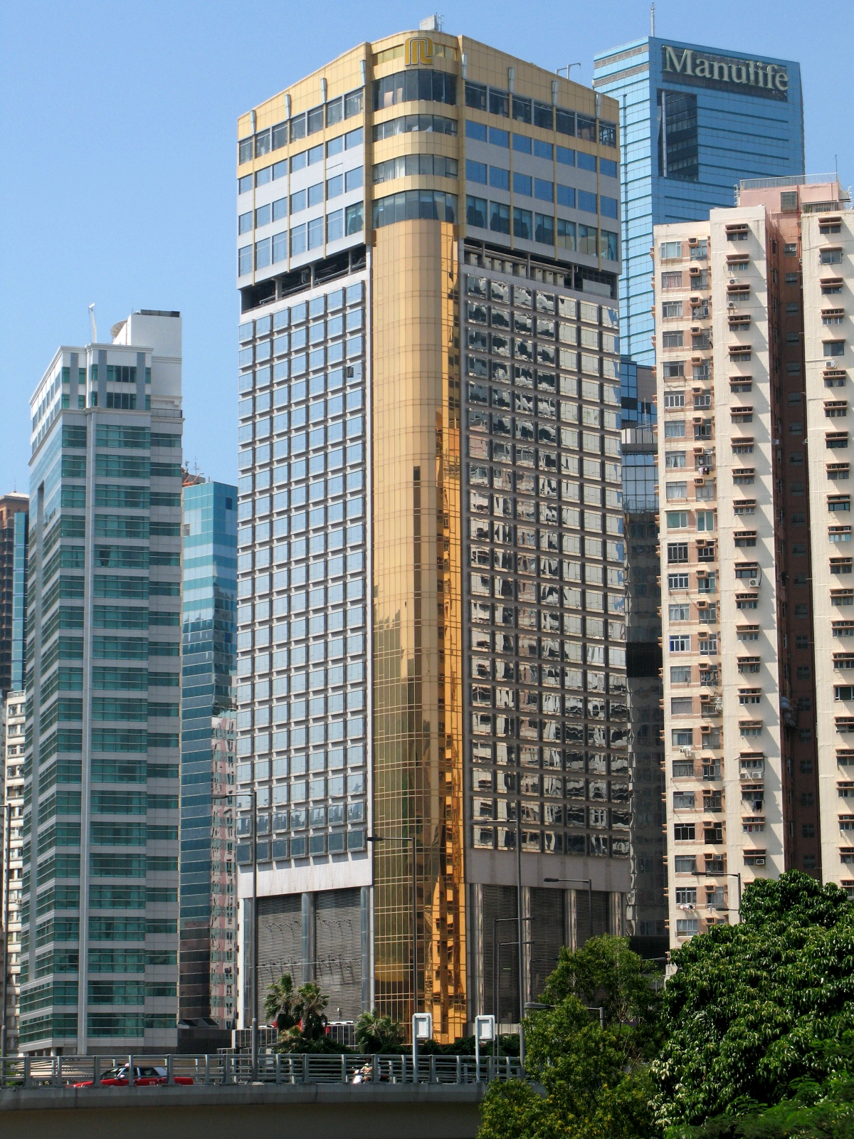 Regal Hong Kong Hotel 富豪香港酒店